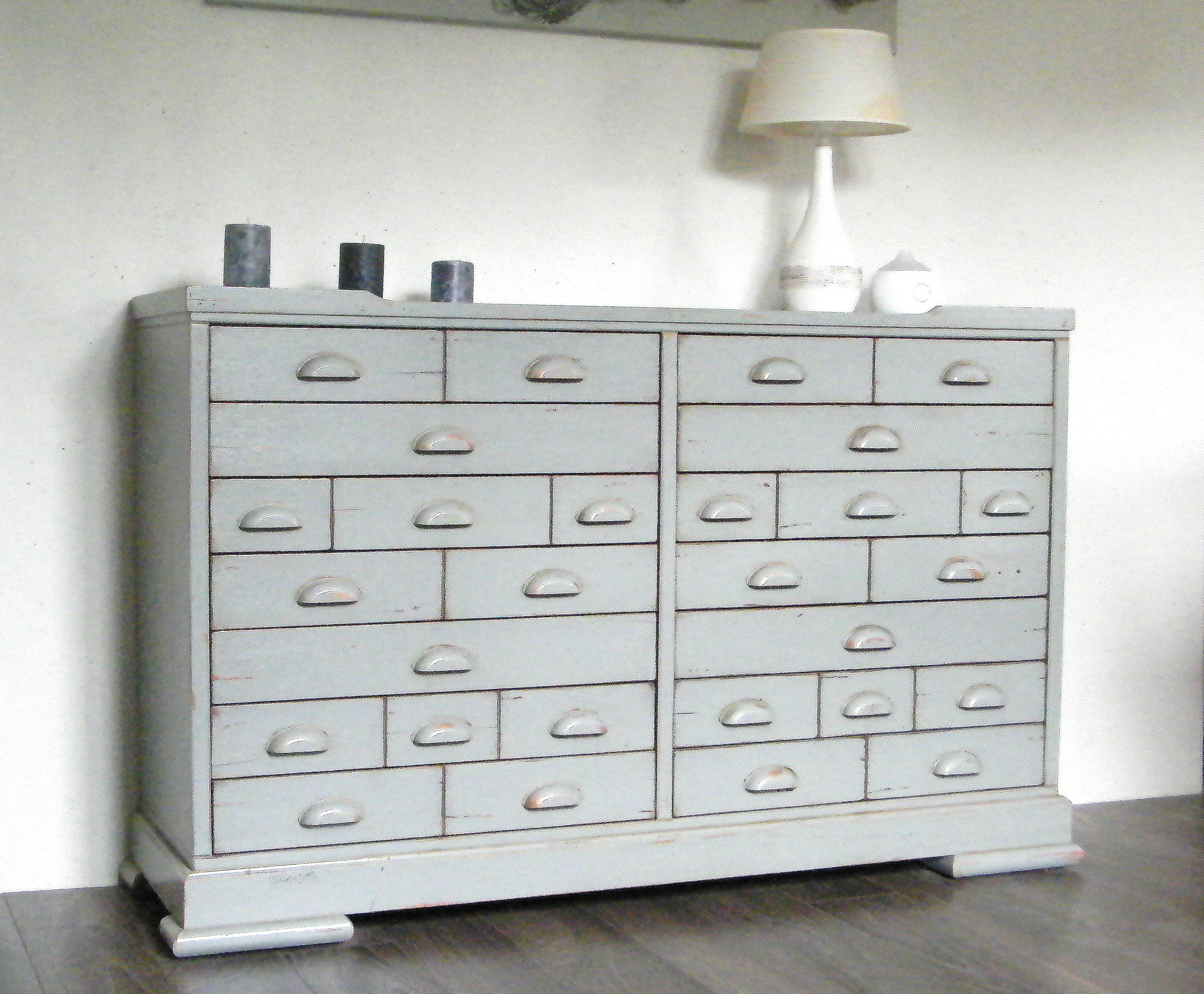 photo du meuble de métier Autise gris patine antiquaire.Meuble créer par tartarin meubles d' art à St Jean de Niost en France